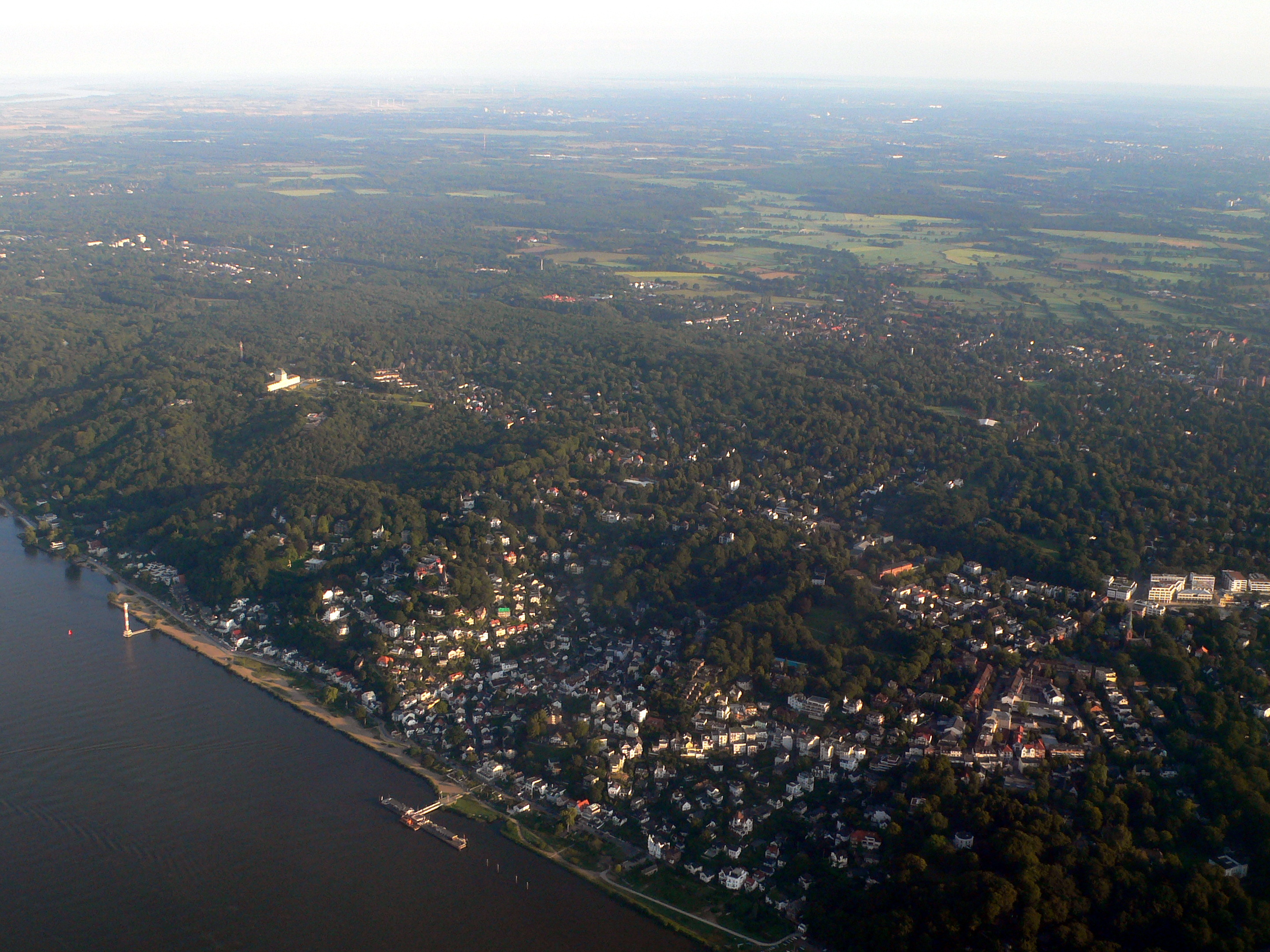 Luftaufnahme von Hamburg-Blankenese